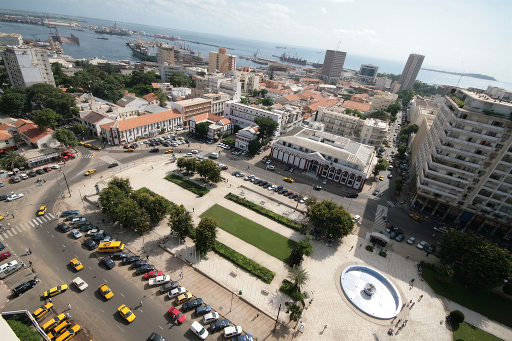 La place de l'Indépendance à Dakar (Sénégal). En arrière-plan le port et Gorée.